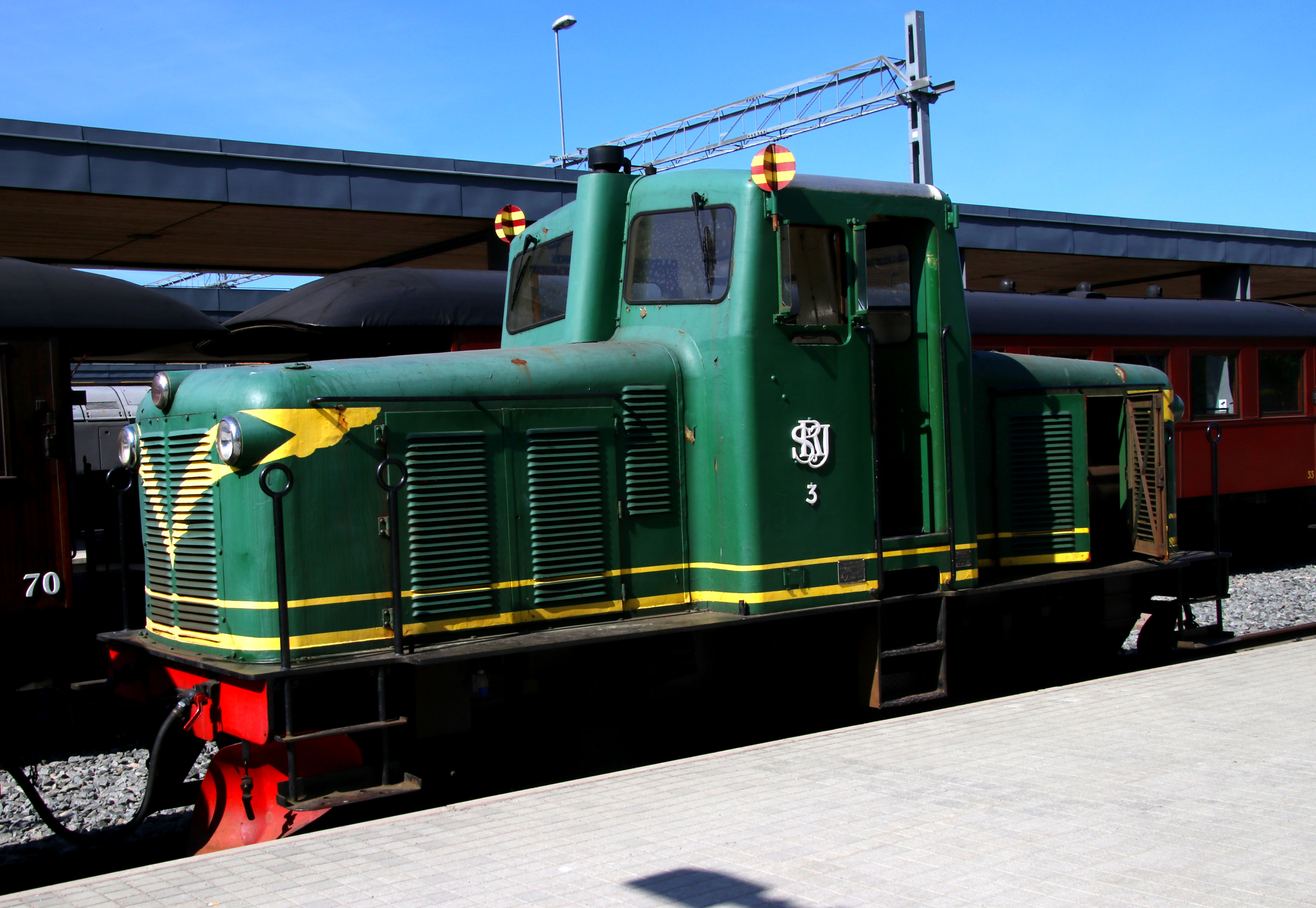 Uppsala. Lennakatten på stationen.